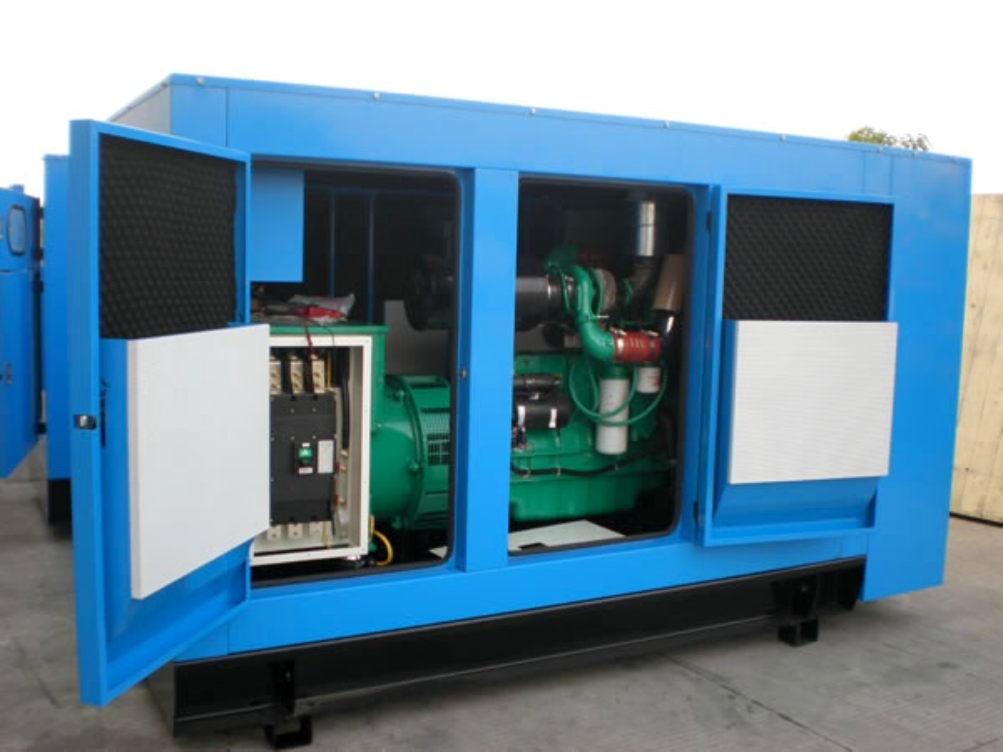 Grupo Gerador Diesel - Para os hangares, potência de 320 KVA, 220/127V/60Hz, quadro de comando automático, acessórios, com chave de transferência e container Super Silenciado Leve (SSL) com carenagem em aço carbono e acessórios.